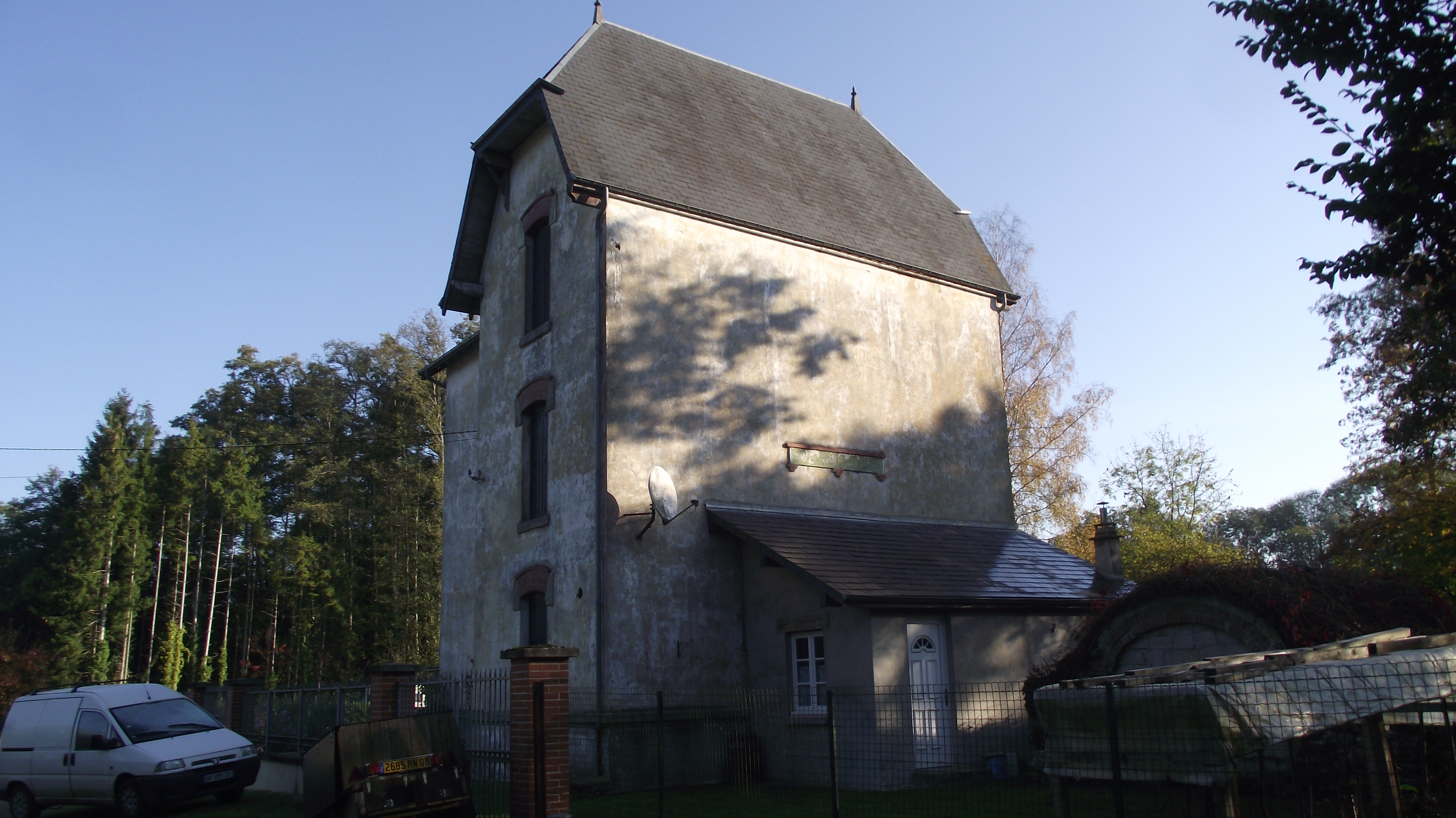 Stationsgebouw van de CFDA (Chemins de fer départementaux des Ardennes) in Vendresse, nu een particuliere woning